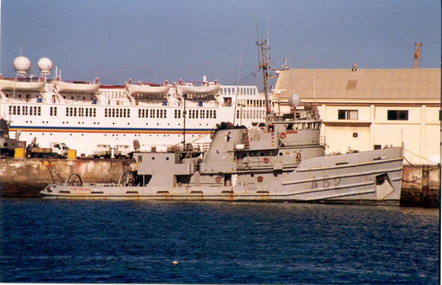 País: España Clase, [Tipo]: Circos, [ATA]. Constructor: Astilleros del Atlántico, Santander, España. Fecha alta: 30 de julio de 1981. Desplazamiento ( toneladas ): 1.437 a plena carga. Dimensiones ( metros ): 41 x 11,6 x 5,5 Propulsión: 2 x diesels AESA/Sulzer 16ASV25/30 ( 7.744 cv ). Velocidad ( nudos ): 13. Autonomía ( millas ): 27.000 a 12 nudos. Dotación: 33 ( 8 oficiales ) + 45 científicos. Cañones: 2 x 12,7mm. Capacidad de transporte: 640 tm combustibles, 100 tm agua. Indicativo: EBDG Comentario: Ex-Somiedo. En grada y botado en 1977, entregado en 1978, fue construido para la Compañía Hispano Americana de Offshore,S.A. Posteriormente fue comprado por el Ministerio de Defensa. Este barco fué diseñado para tareas de apoyo y suministro para plataformas petrolíferas, y es por ello que conserva un gran radio de acción, lo que sin duda fue determinante para su elección como buque de investigación antártica, antes de la entrada en servicio del Hespérides. El Las Palmas fue reconvertido a dichas tareas en 1988, para lo cual fue necesario reforzar su proa con planchas de 20mm y añadir un moderno sistema de comunicaciones por satélite, habilitación para 22 investigadores y estiba a popa para dos contenedores científicos. Con la entrada en servicio del Hespérides el barco fue reconvertido otra vez a su labor original como remolcador y repintado de color gris. En el año 2002 ha vuelto a ser repintado con los colores rojo y blanco tan típicos de las naves de investigación antártica, y participará en tareas de apoyo junto al Hespérides durante la presente campaña. A partir del 30 de Abril de 2004 traslada su base a Cartagena. Base: Cartagena. Unidades similares: A51 Mahón